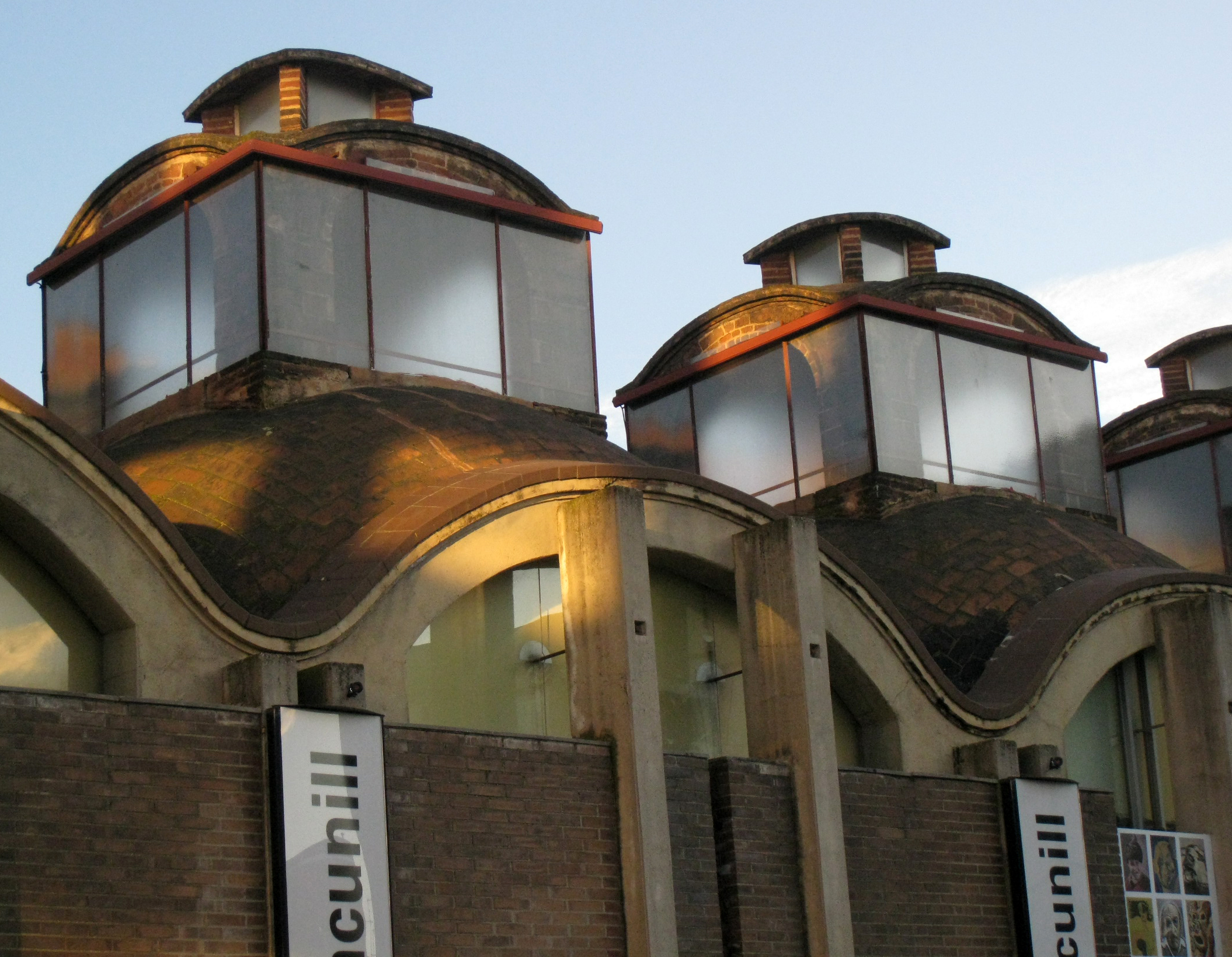 Sala Muncunill (Terrassa)